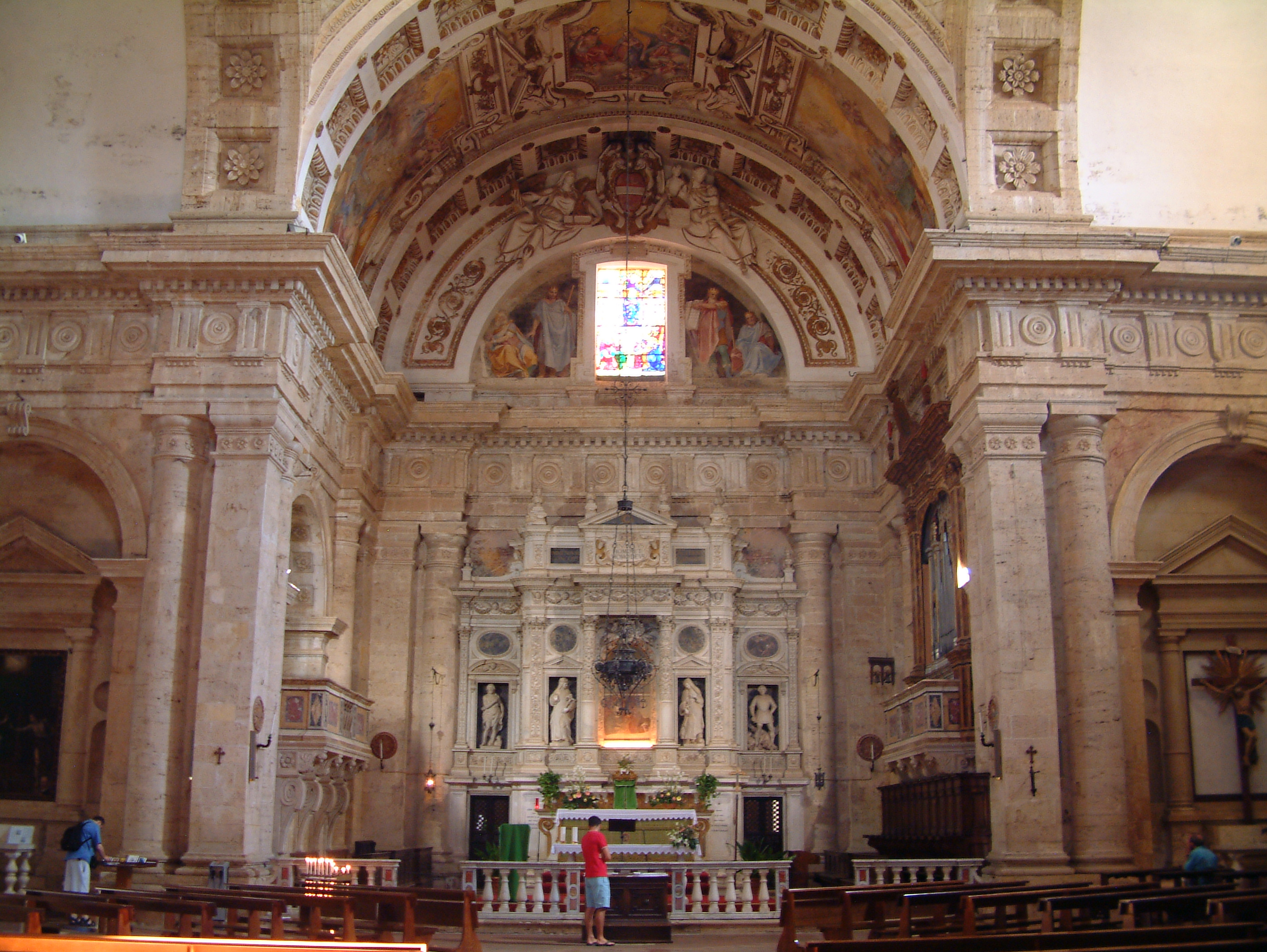 Montepulciano - Madonna di San Biagio